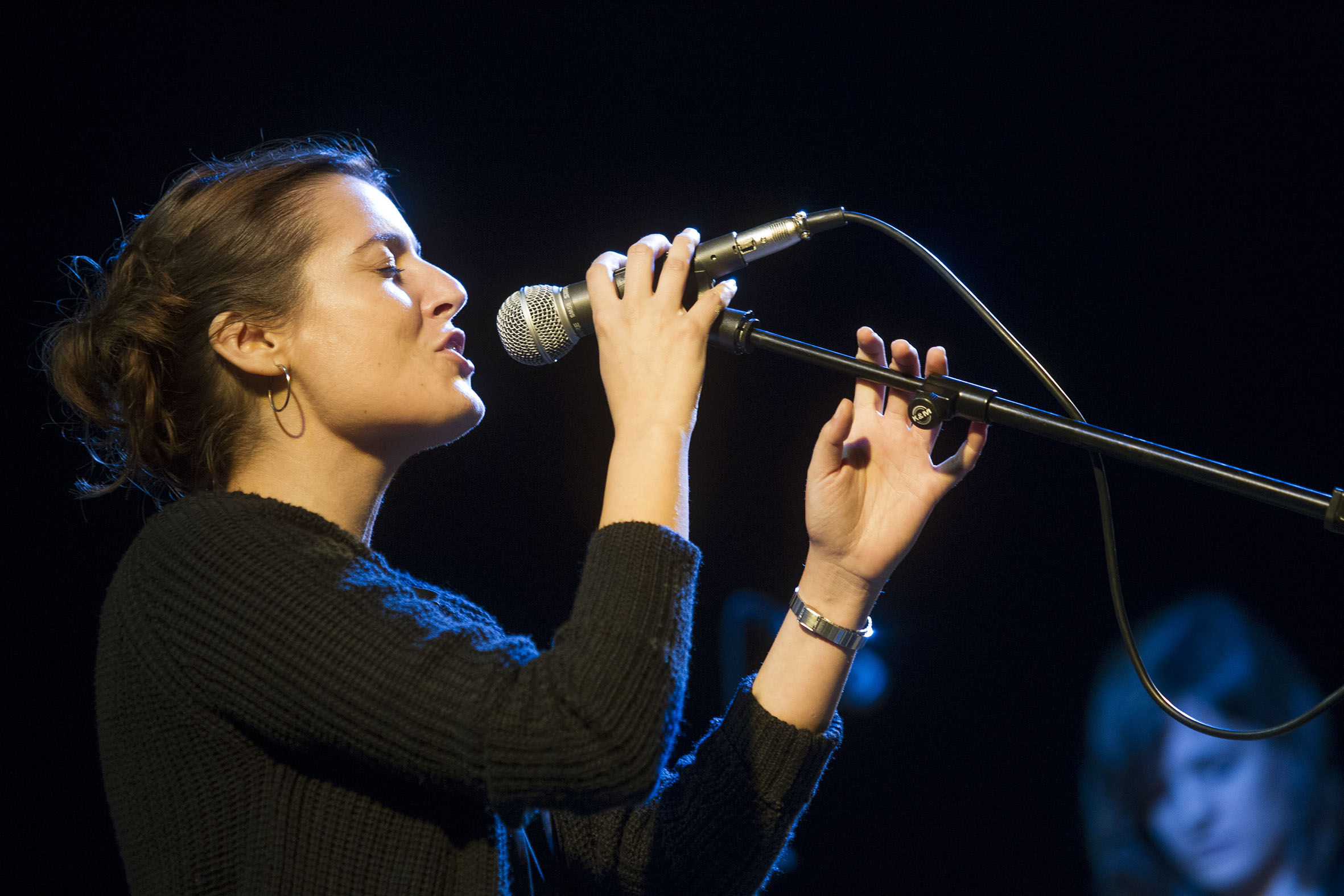 Foto: Carme Ripollés